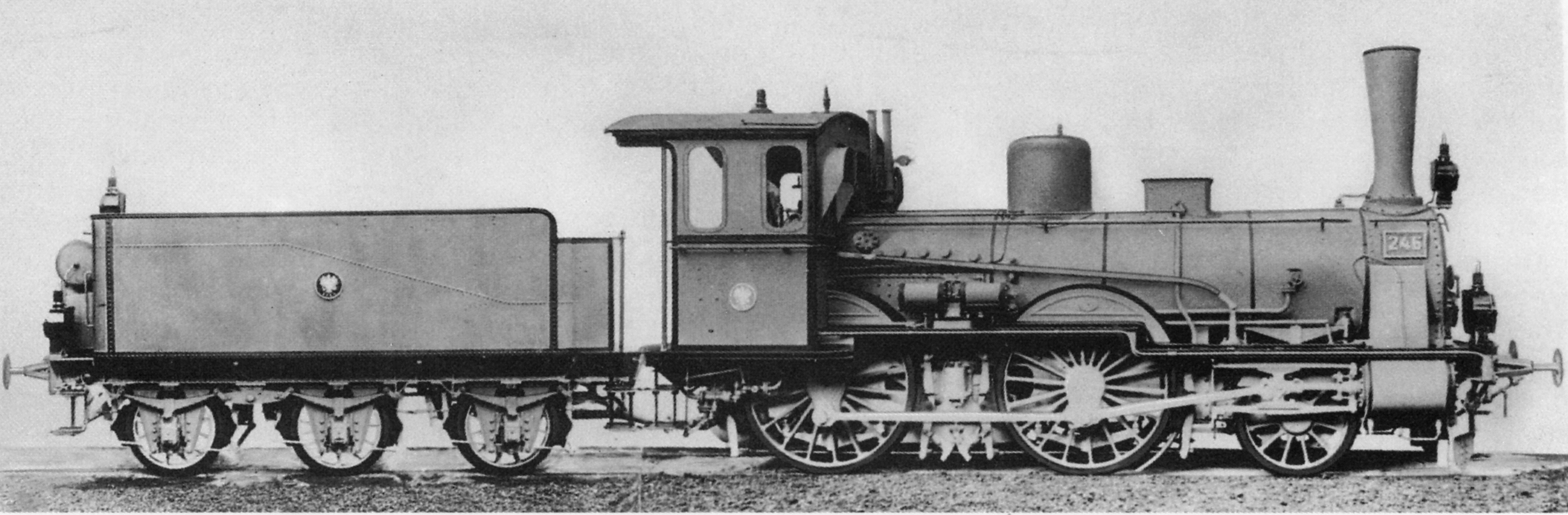 Dampflokomotive Preußische P3.1.